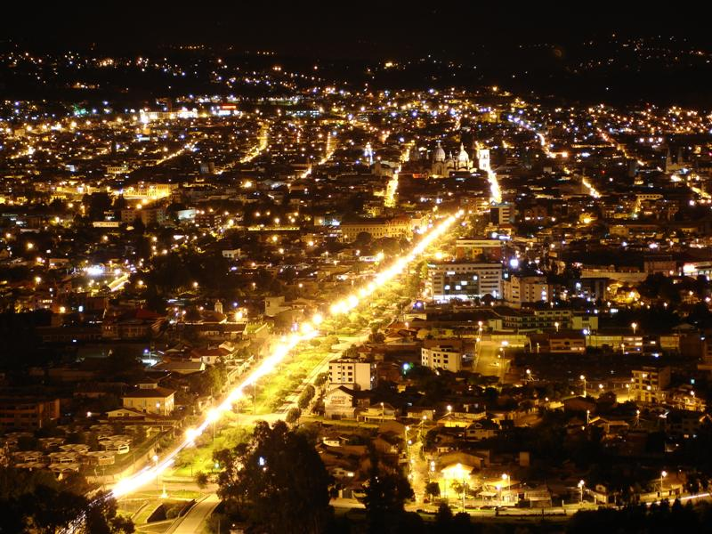 Vista nocturna de la Avenida Solano en la parte moderna de Cuenca, al tope se aprecia la Catedral Nueva, la cual ya en la zona antigua.